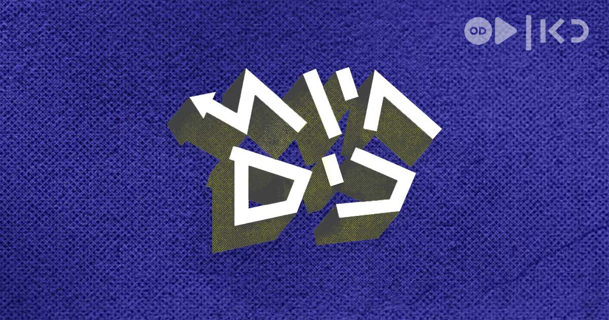 לוגו חיות כיס